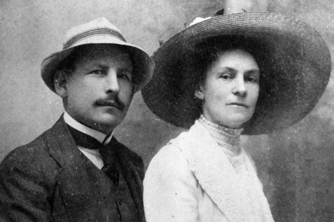 Вацлаў Іваноўскі з першай жонкай Сабінай (фота з кнігі Ю.Туронка "Вацлаў Іваноўскі і адраджэнне Беларусі")